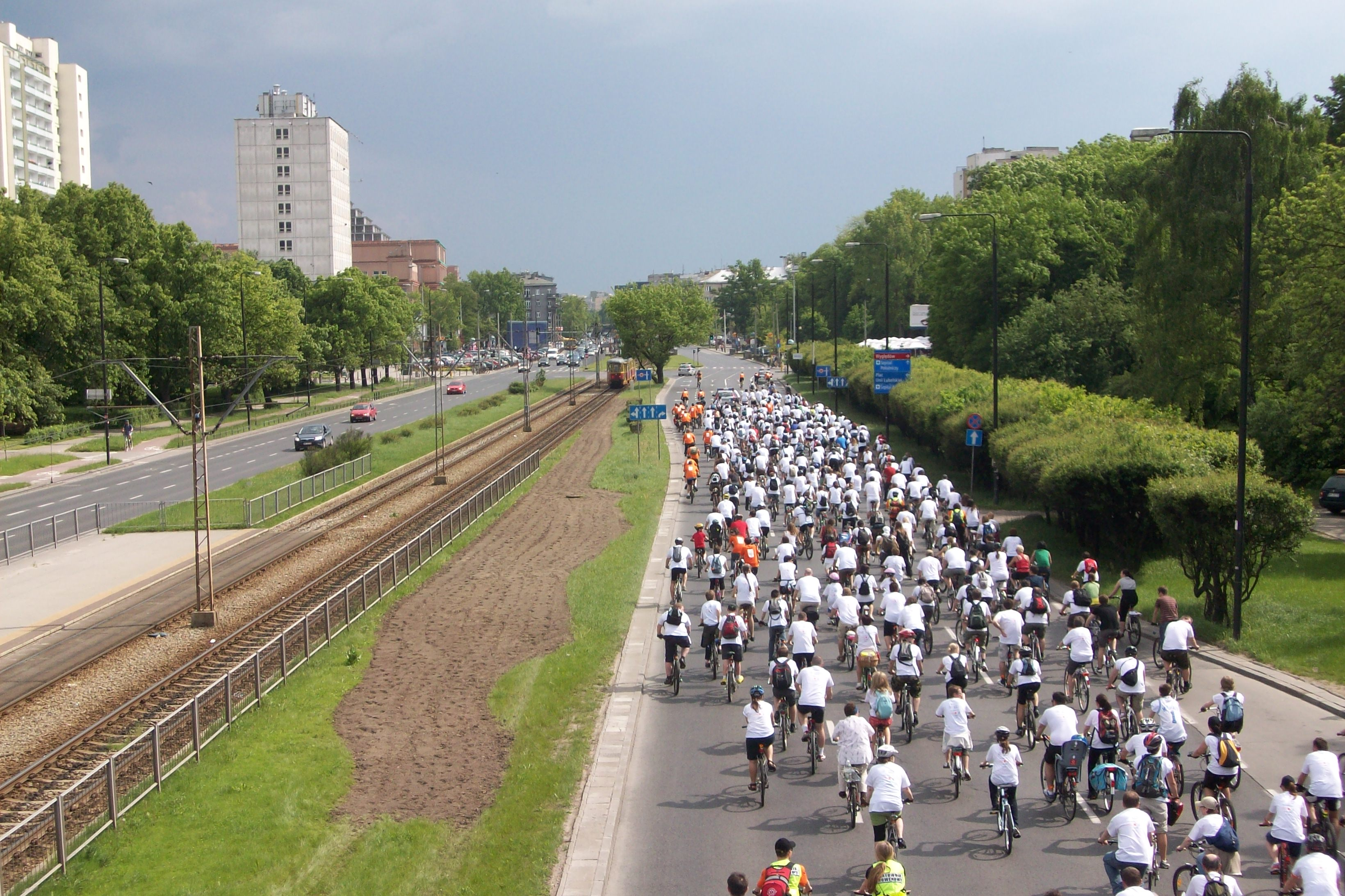 Masa na Autyzm - przejazd Aleją Niepodległości w Warszawie 22 maja 2010 roku (widok w kierunku południowym).